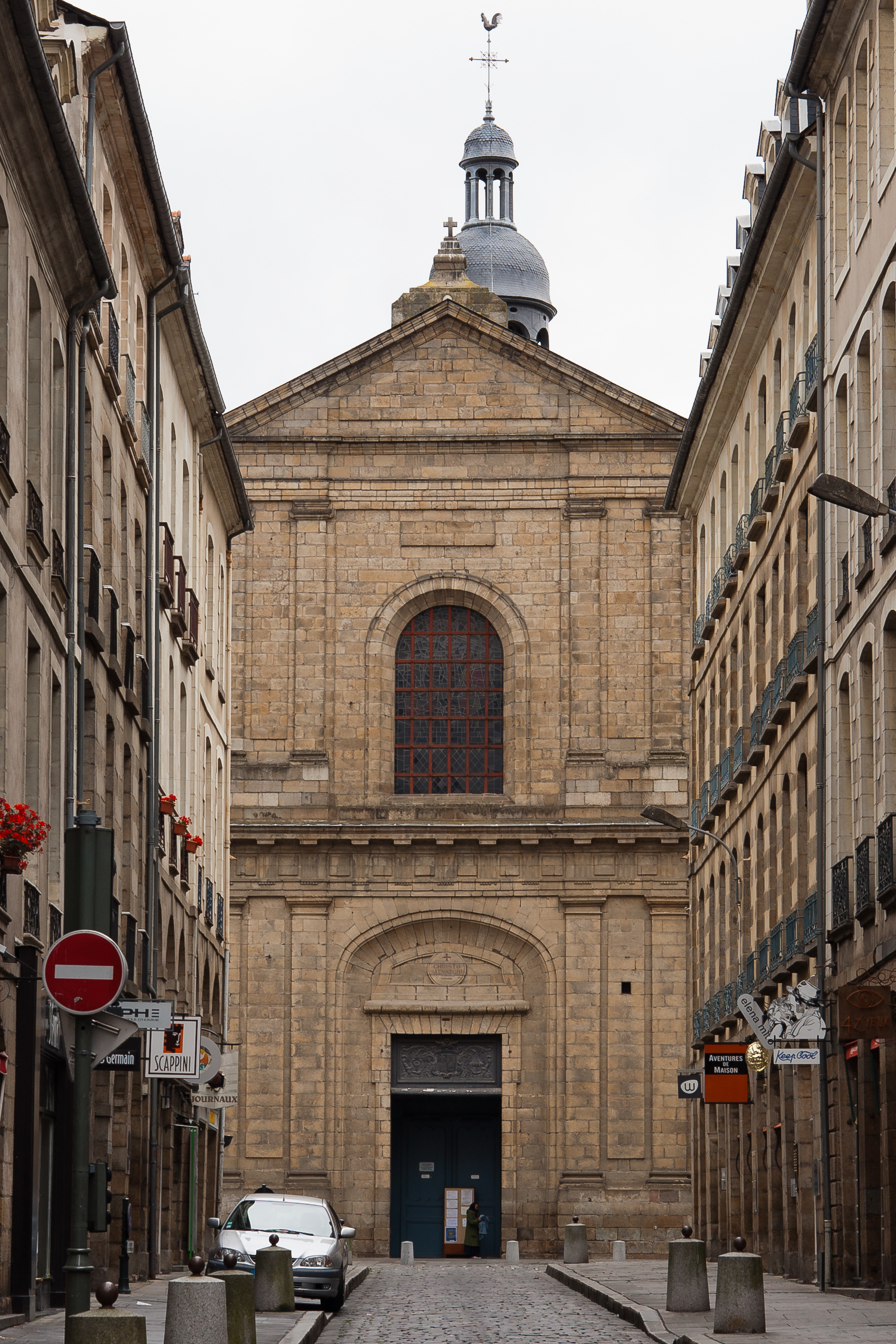 La photographie est prise de l'extrémité est de la rue du Guesclin, afin de souligner la mise en perspective de la façade. On voit le sommet du beffroi, mais les côtés de la façade et la tour (au nord) sont masqués par les immeubles de la rue. L'inscription « christo salvatori » en médaillon au dessus du portail indique la dédication de l'église au Saint-Sauveur.